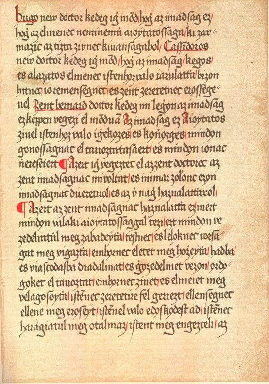 A Guary-kódex 52. lapja. XVI. század első fele.